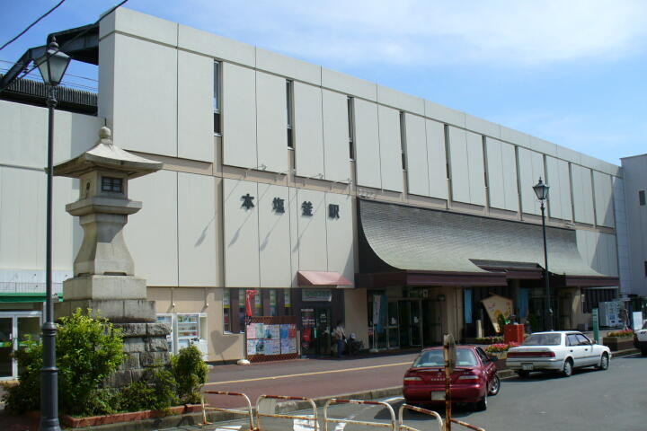 仙石線本塩釜駅